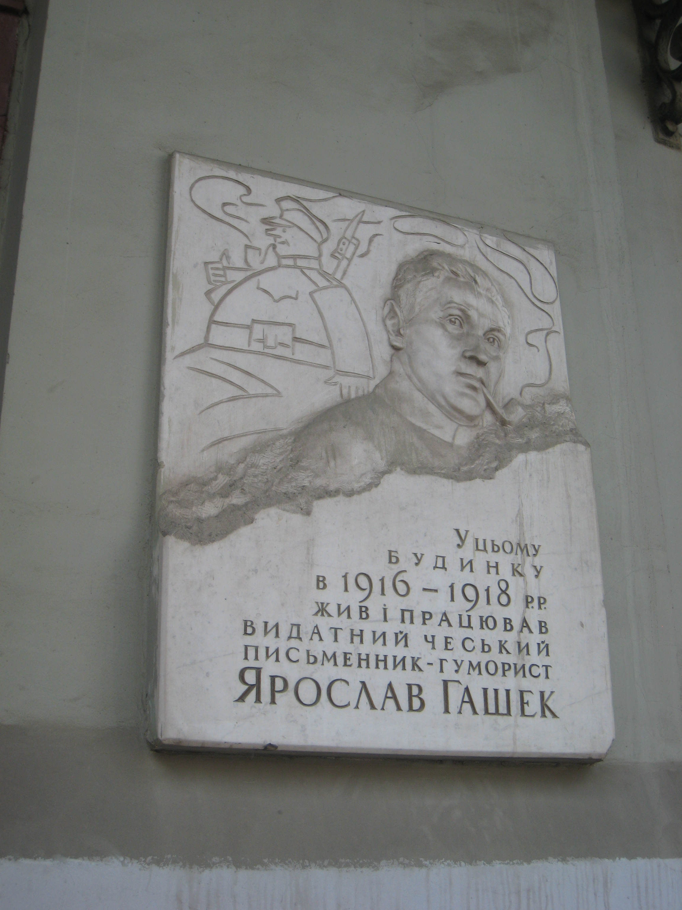 "In quest'edficio dal 1916 al 1918 visse e lavorò ... lo scrittore umorista ceco Jaroslav Hašek"